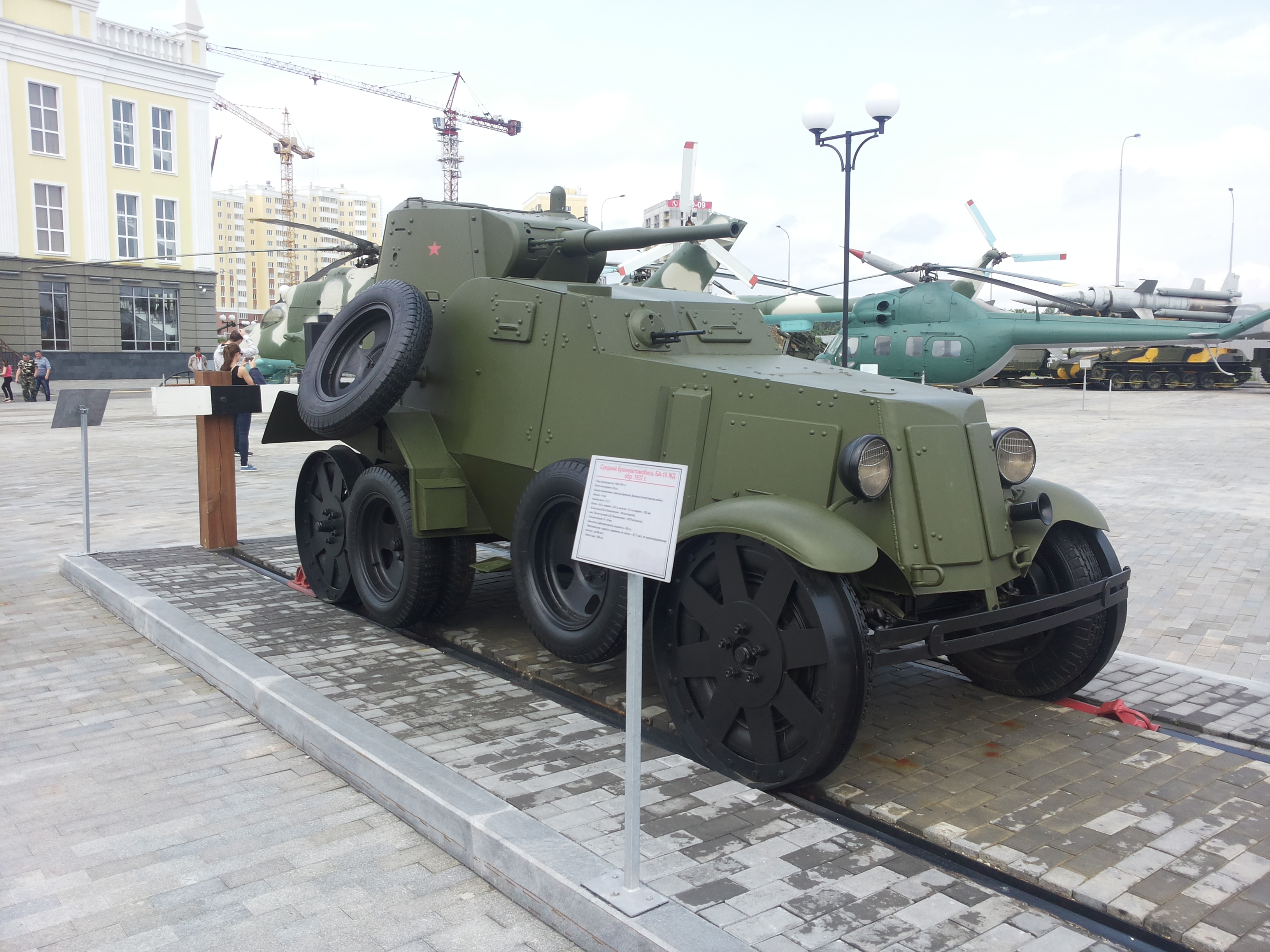 Музей военной техники «Боевая слава Урала»